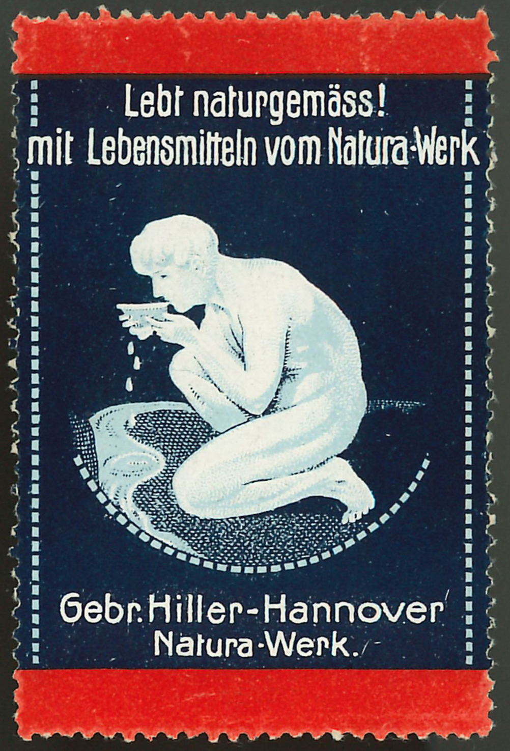 Mehrfarbige Reklamemarke mit der Aufforderung „Lebt naturgemäß! mit Lebensmitteln vom Natura-Werk“ Unter dem aus einer Schale klares Wasser trinkenden nackten Jünglings die Firmierung „Gebr. Hiller- Hannover Natura-Werk“ ...